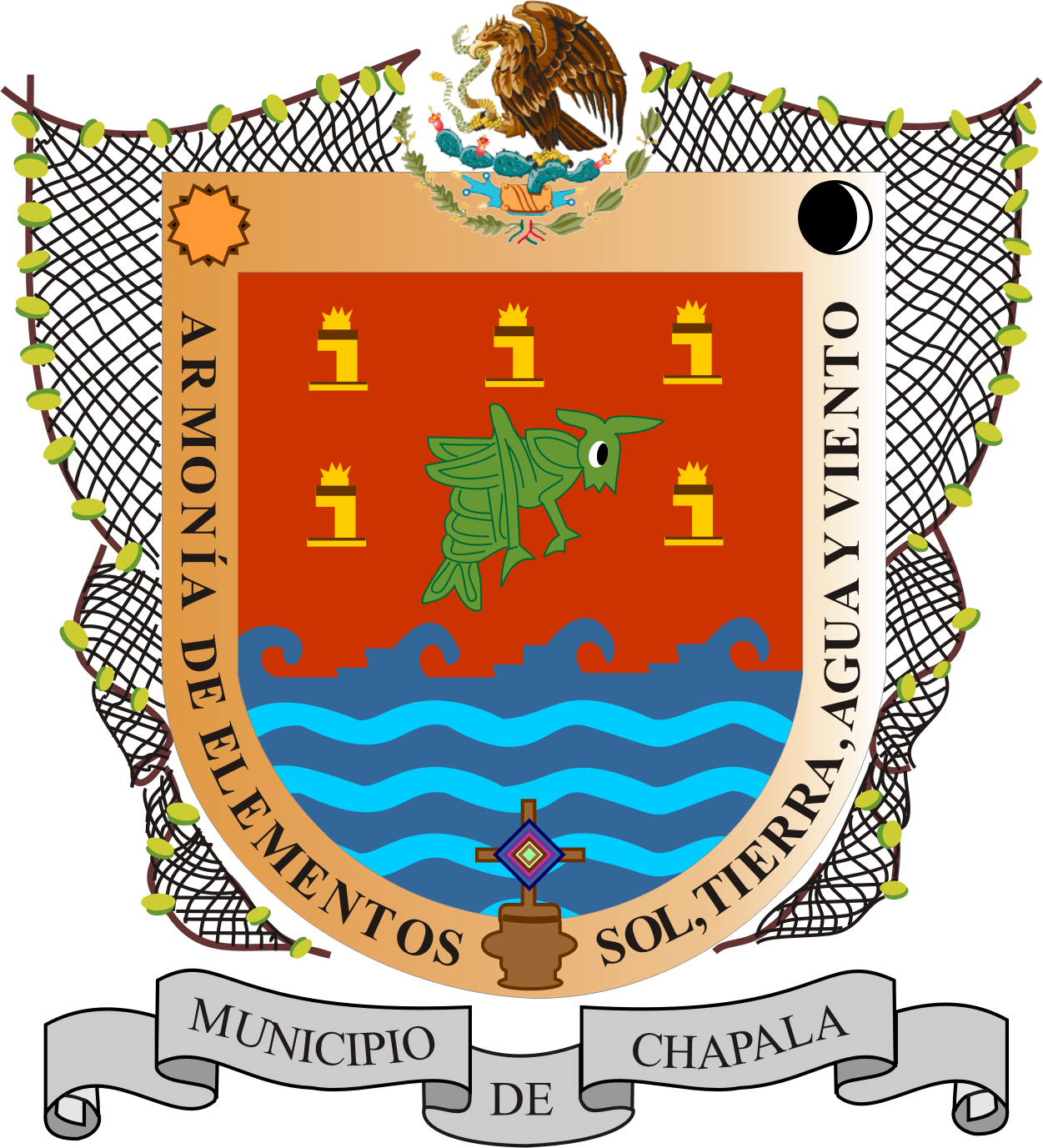 Blasón del municipio de Chapala, Jalisco, México.